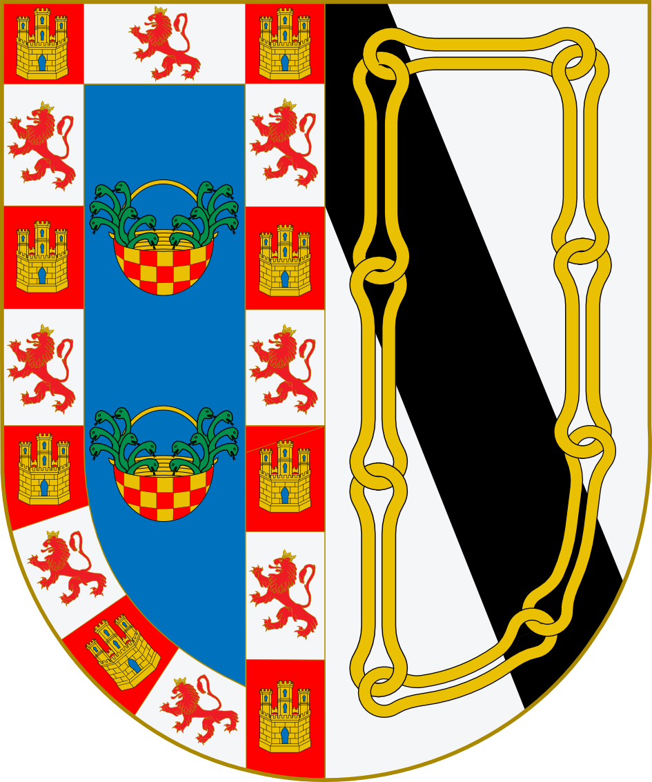 Escudo partido en dos, el primero casa Guzmán, el segundo Zuñiga.